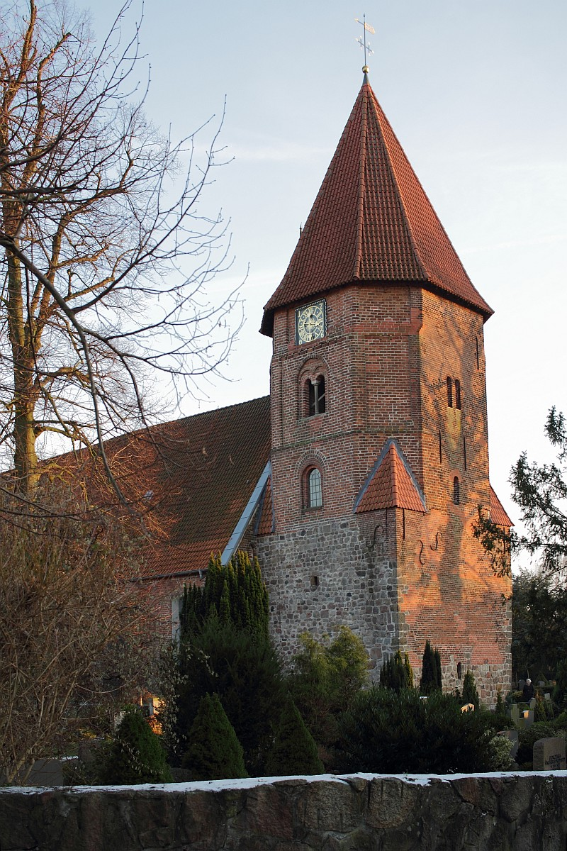 St. Laurentius Kirche in Achim (Landkreis Verden)